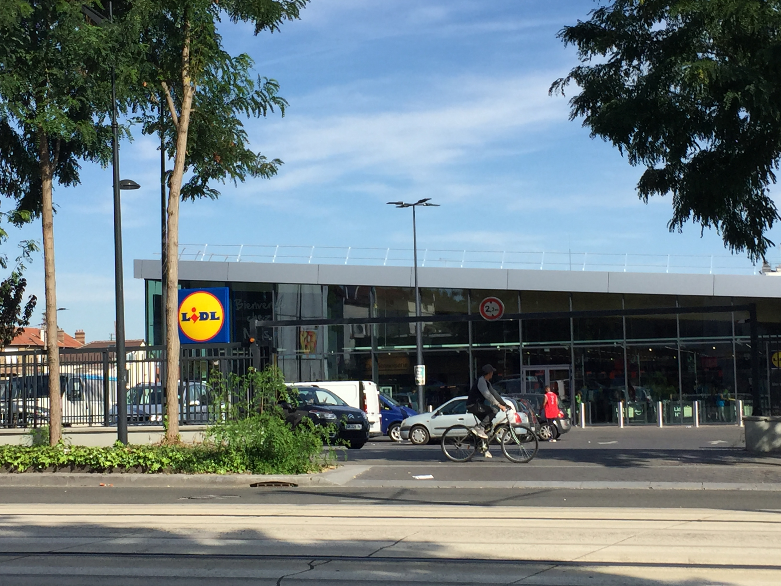 Vue de la façade du supermarché Lidl de Pierrefitte-sur-Seine, le long de l'ex-RN1 en août 2019.